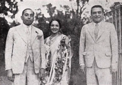 Rai Bahadur Chuni Lall, Devika Rani et Himansu Rai (mars 1939)